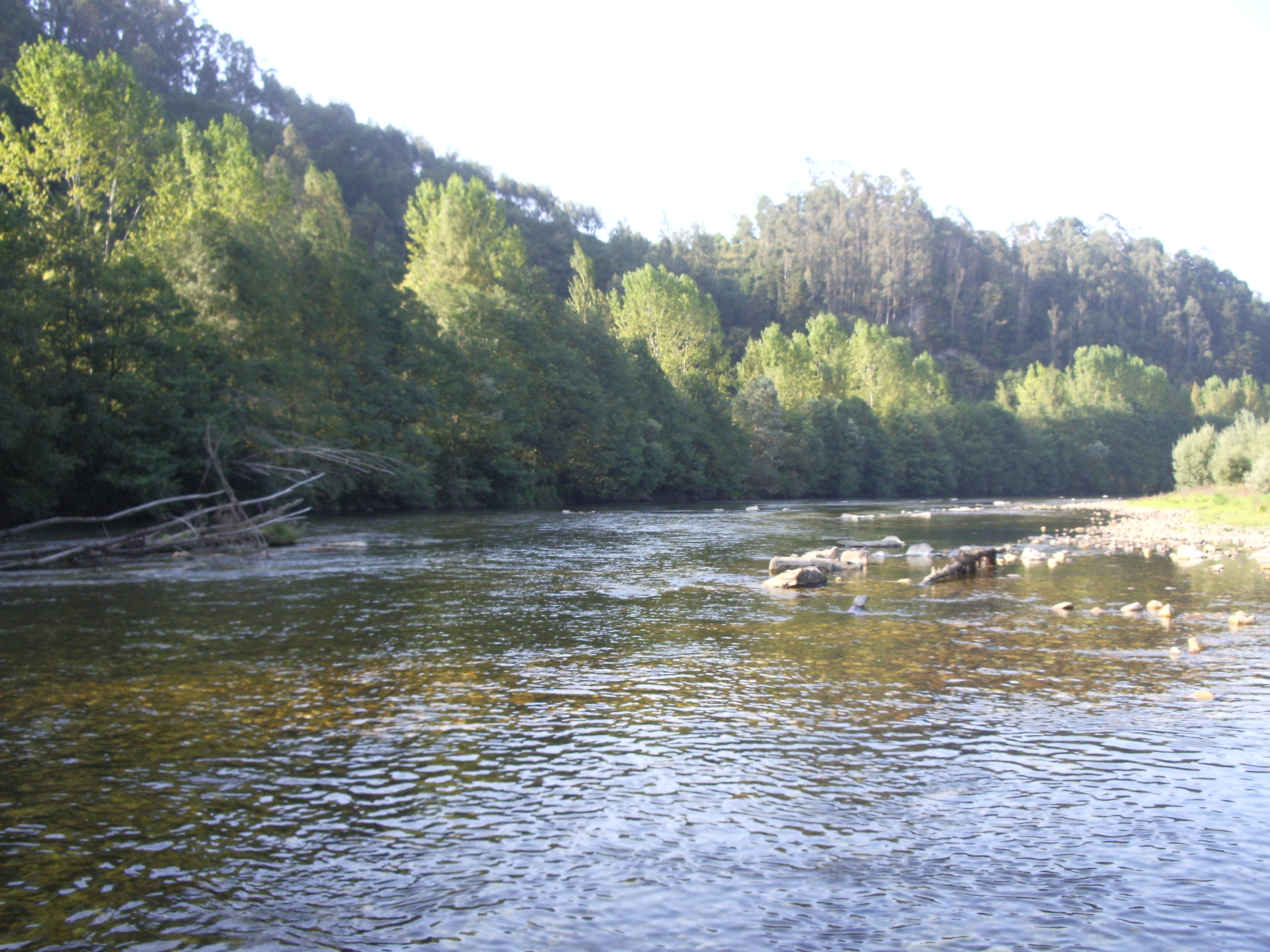 Río Narcea, a su paso por Quinzanas